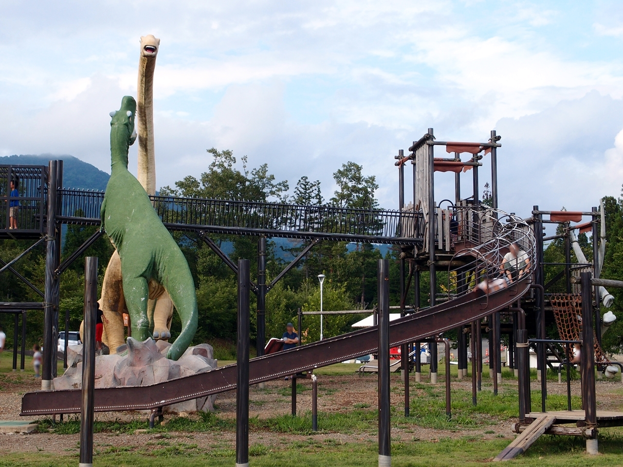 福井県勝山市のかつやま恐竜の森(長尾山総合公園)内にあるティラノサウルス広場